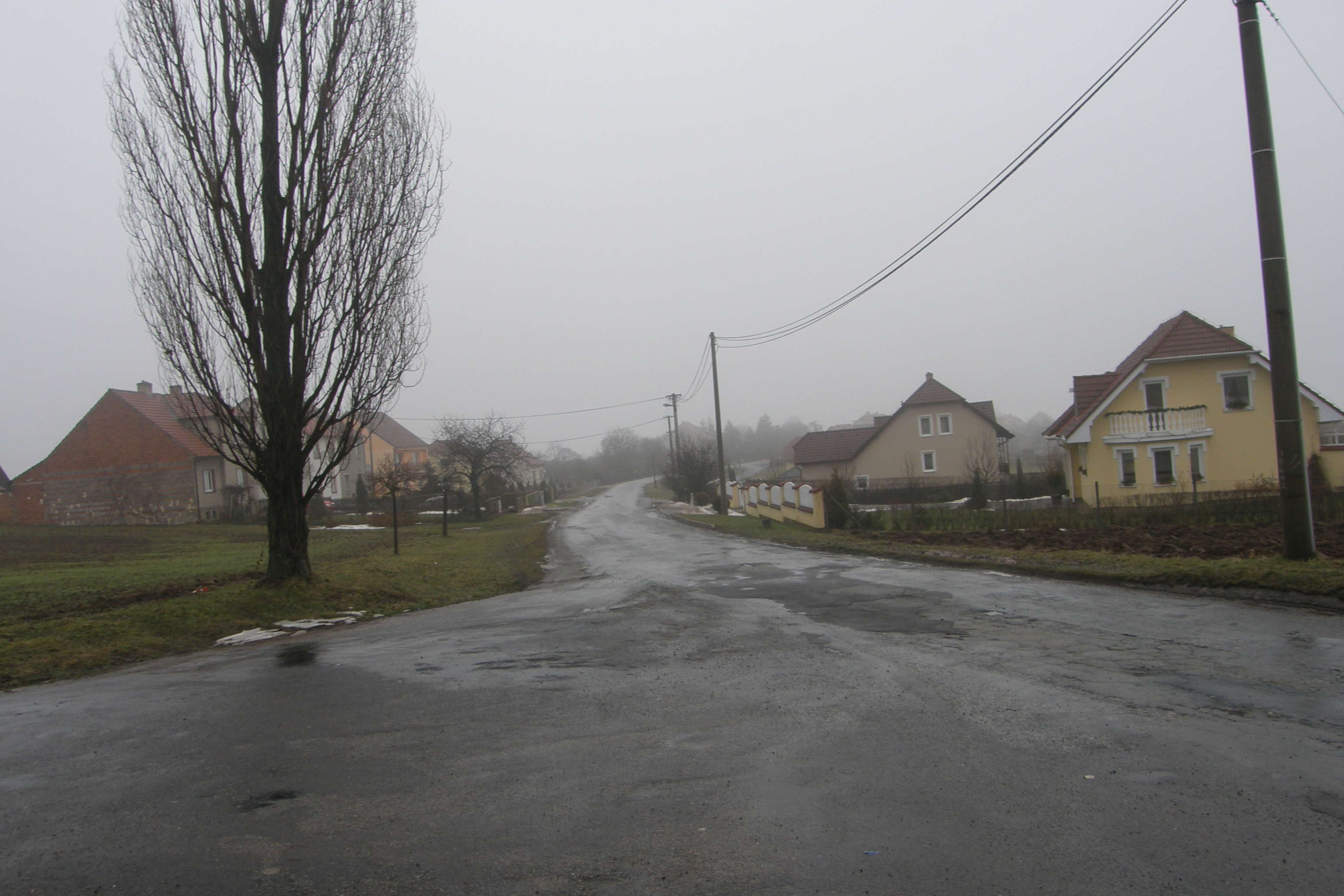 Pamětice